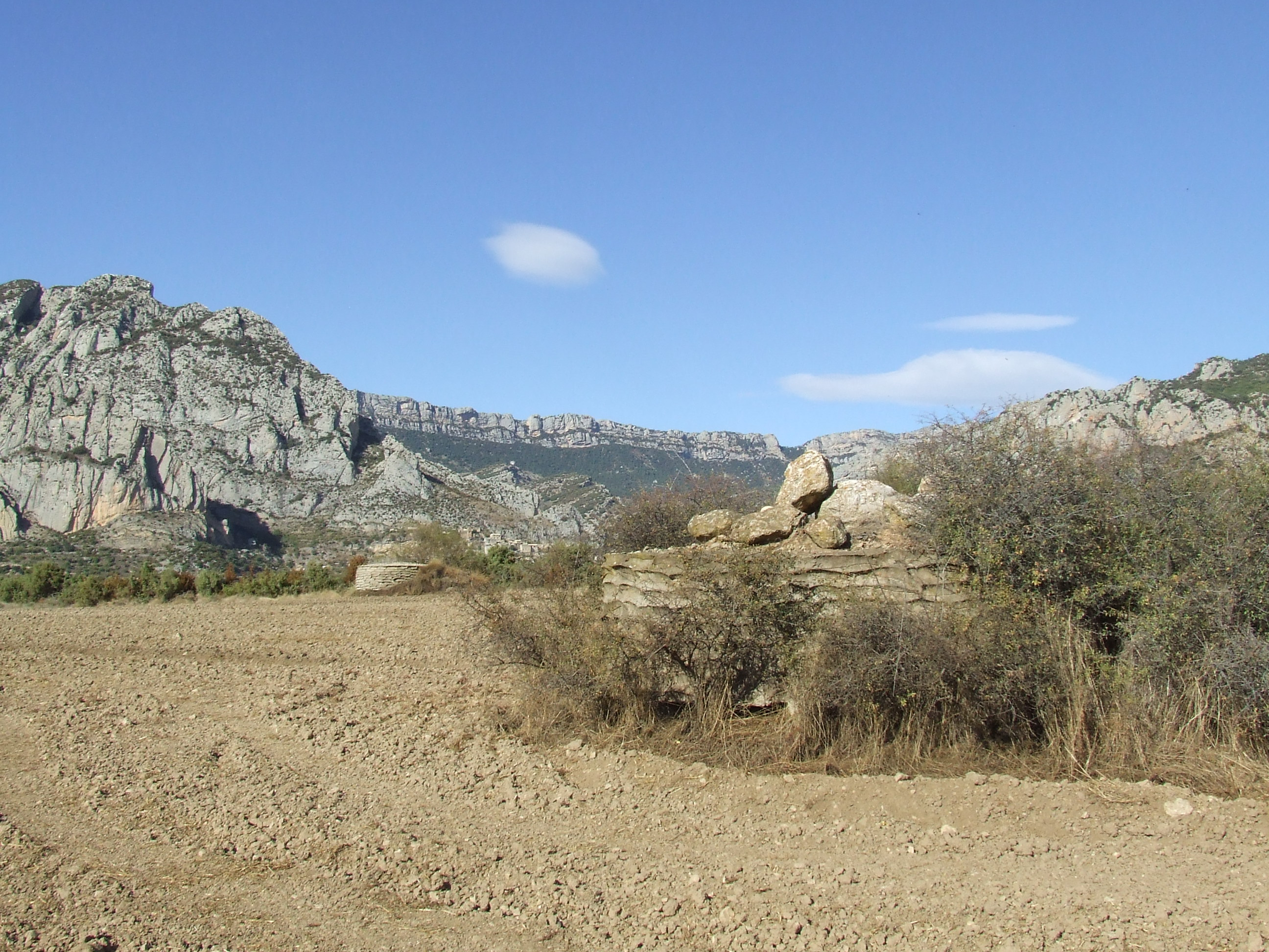 Búnquers del Cap del Pla (Abella de la Conca, Pallars Jussà)